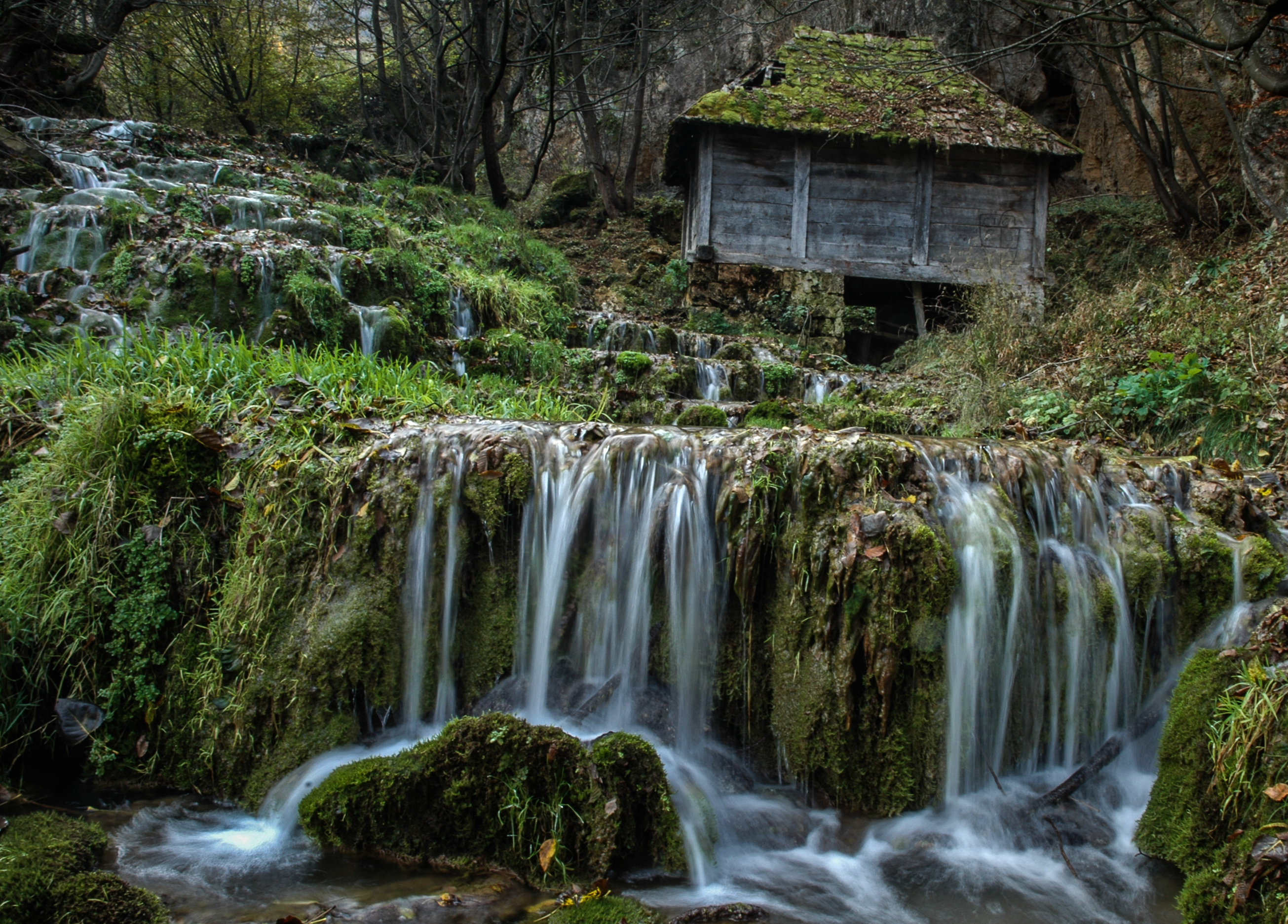 Ово је фотографија заштићеног природног добра у Србији под шифром: СП232This is a a photo of a natural area in Serbia with ID: СП232